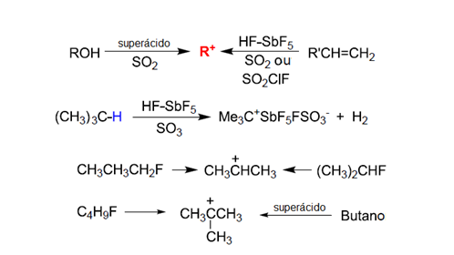 Quimica Cabo